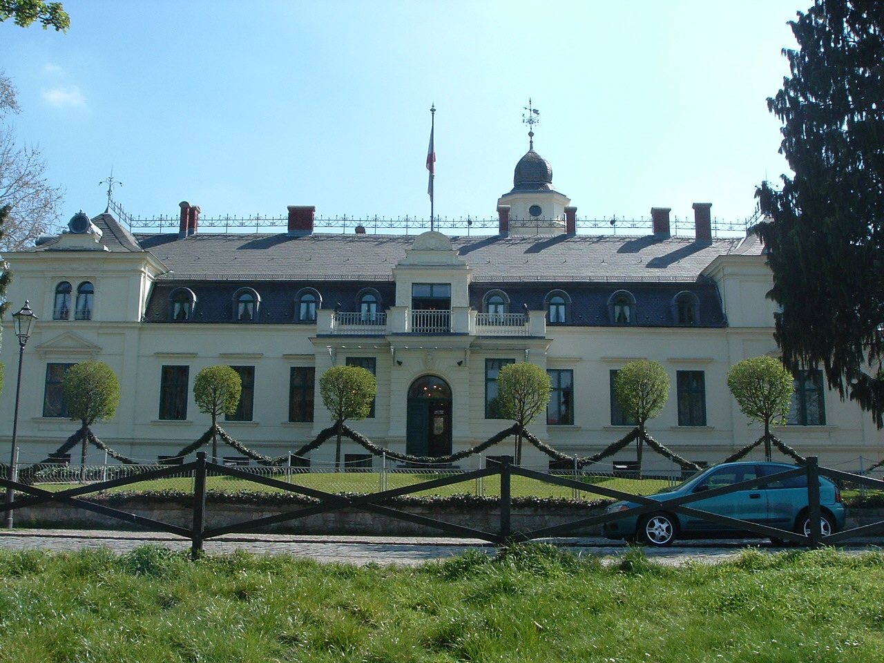 Vorderansicht von Schloss Britz